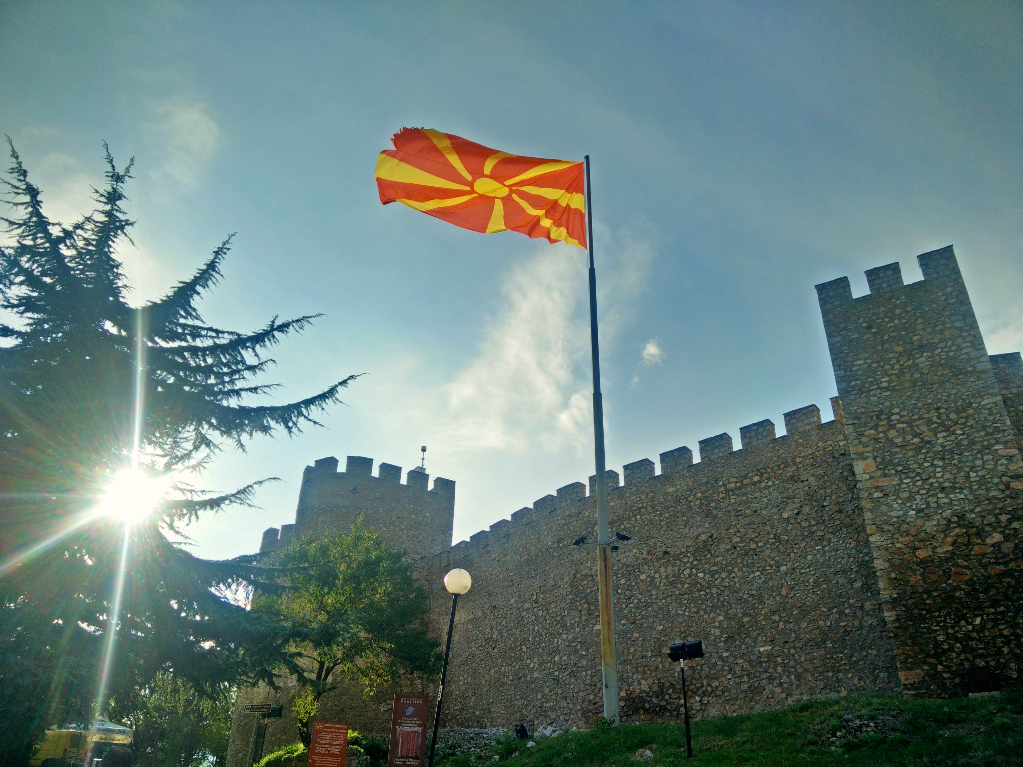 Самоилова тврдина (надворешен дел) - Охрид, Македонија